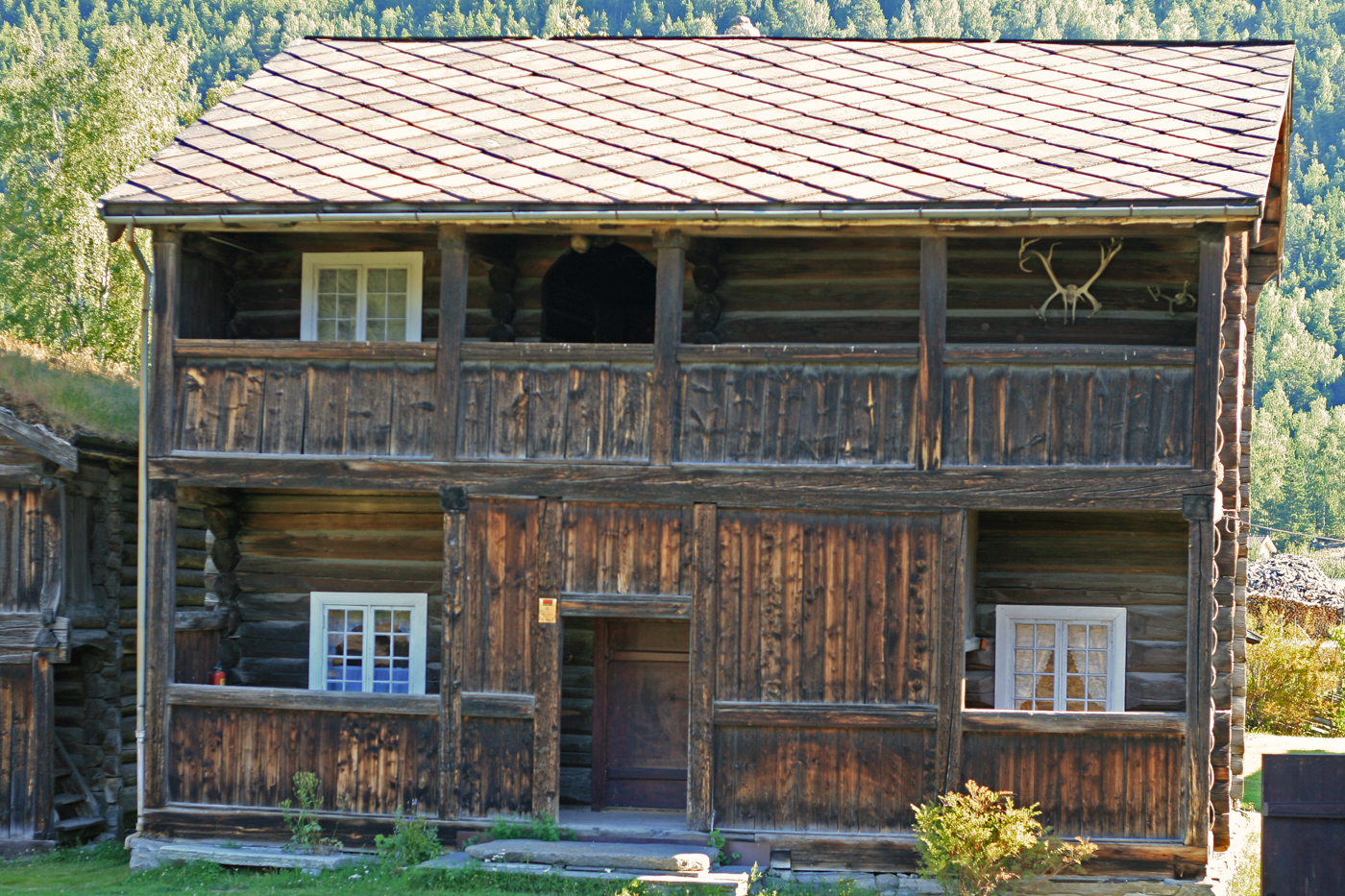 Bolighus (nedre stugu) på Romundgard i Sel. Freda 1923.